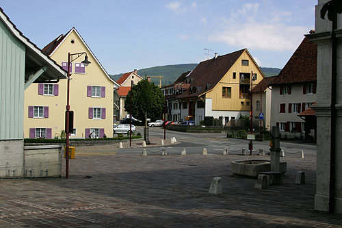 Dorfzentrum von Röschenz